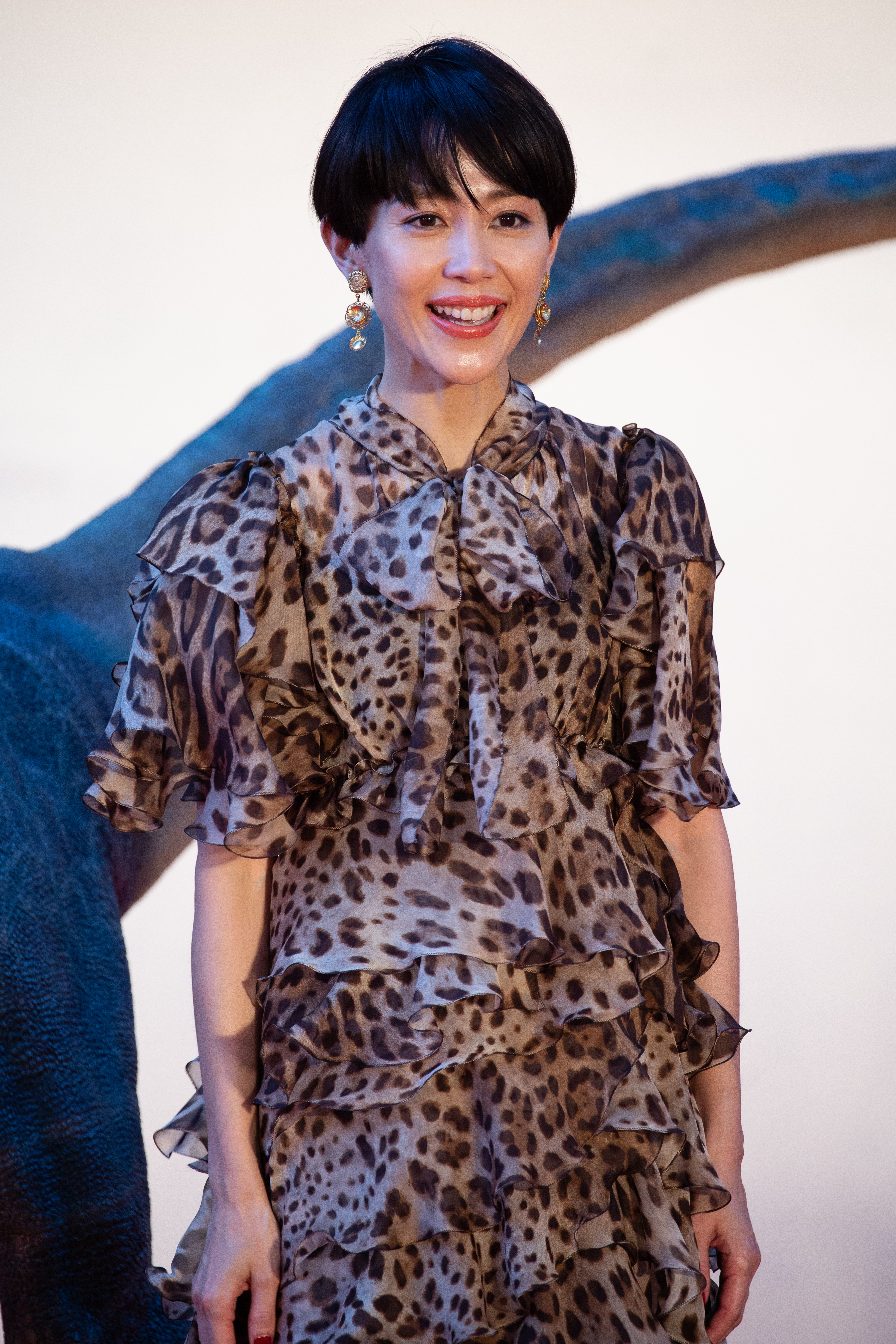 ジュラシック・ワールド/炎の王国 ジャパン・プレミア レッドカーペット 木村佳乃